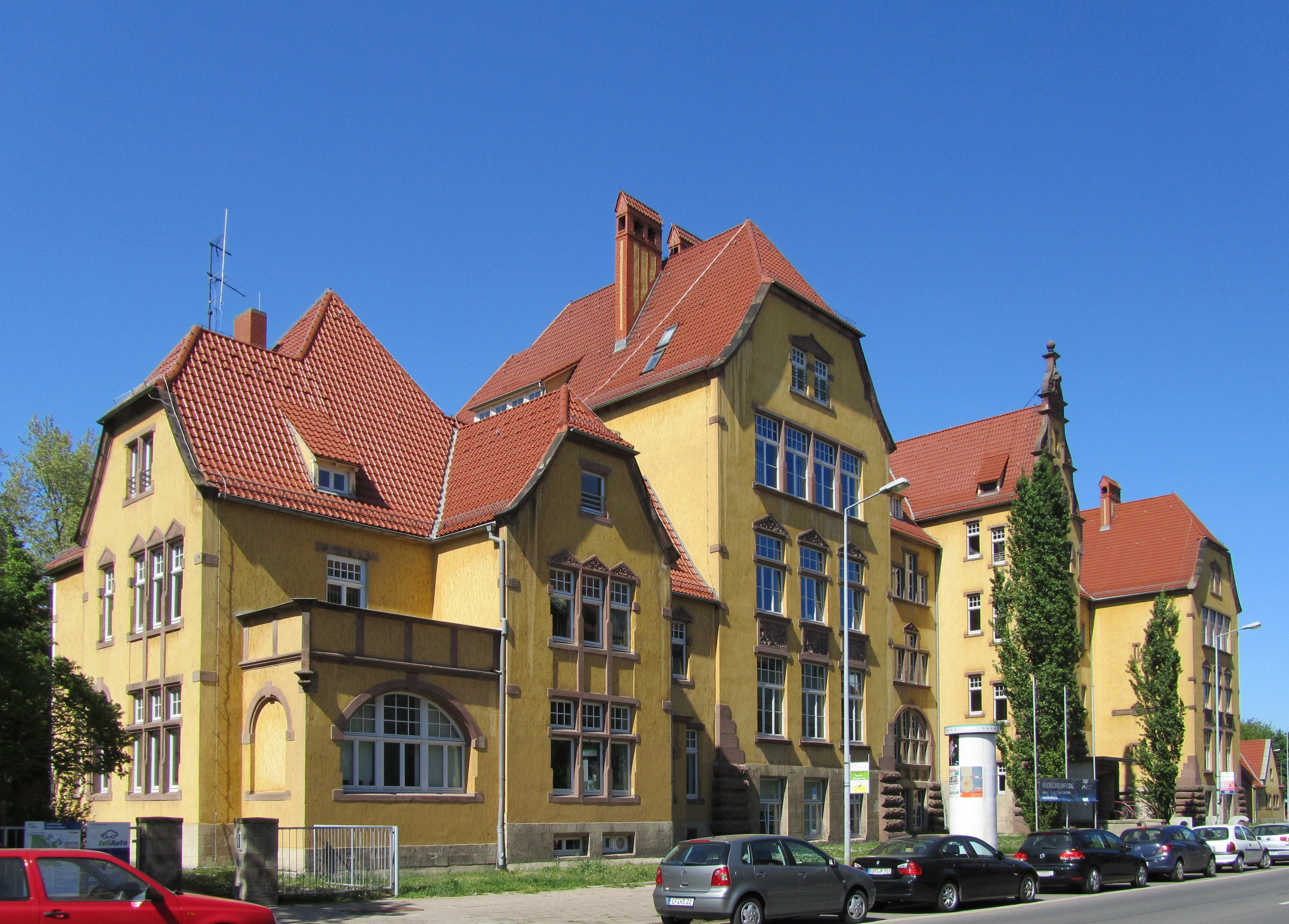 Der Fachbereich Architektur und Stadtplanung der FH in Erfurt.